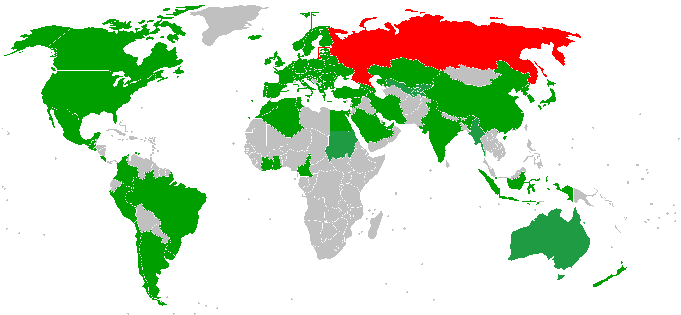 Все соперники сборных Российской империи, СССР и современной России по футболу.